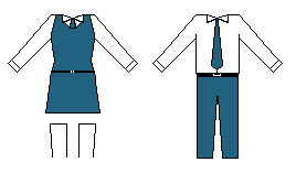 Uniforme del Colegio Salesianito de Asunción, Paraguay.